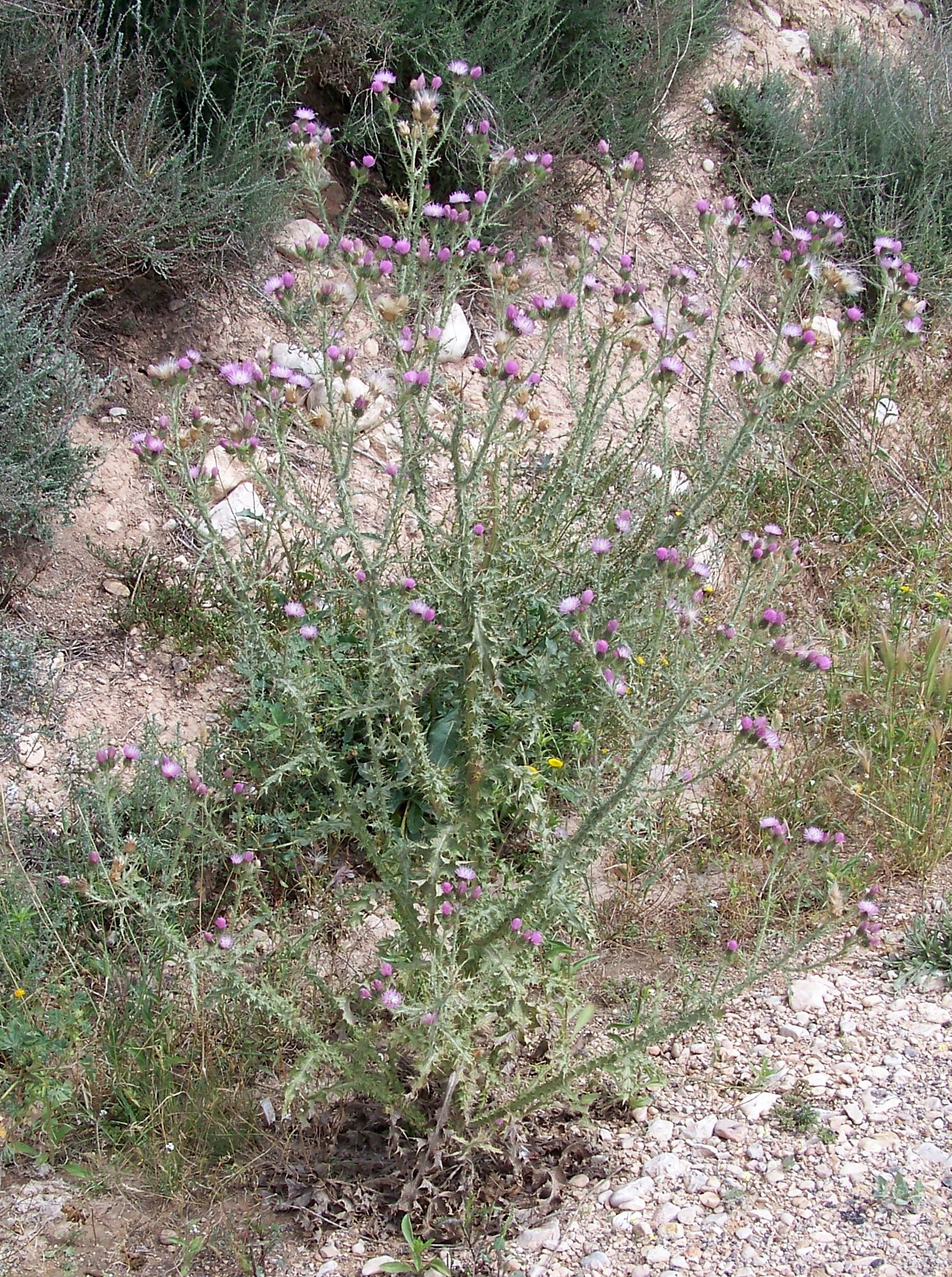 Carduus de la Sección Homalotepidoti ( Carduus bourgeanus ) : Aspecto general - Vereda de Orihuela, Albatera (Alicante, España).